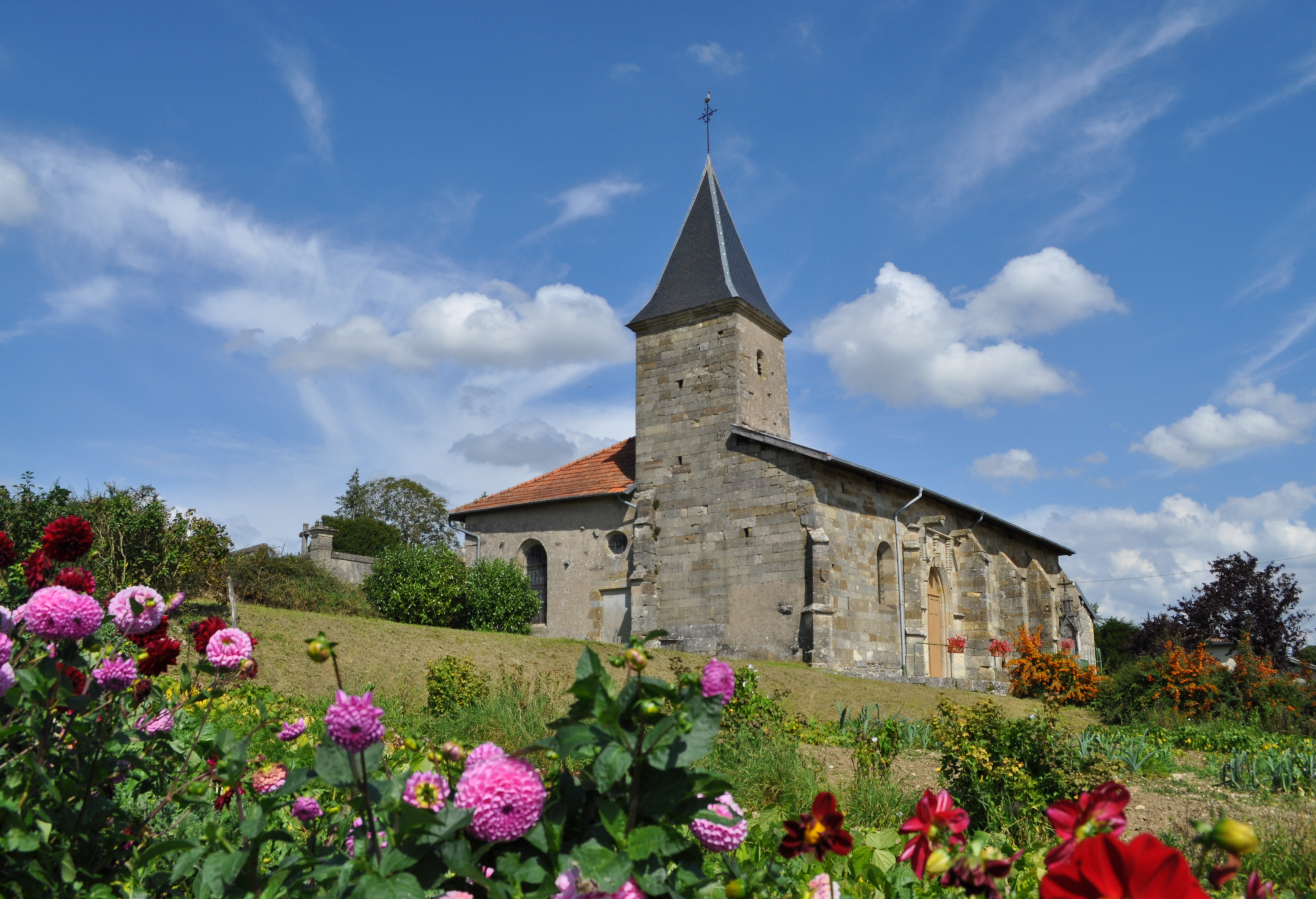 Église de la Nativité-Notre-Dame de Seigneulles